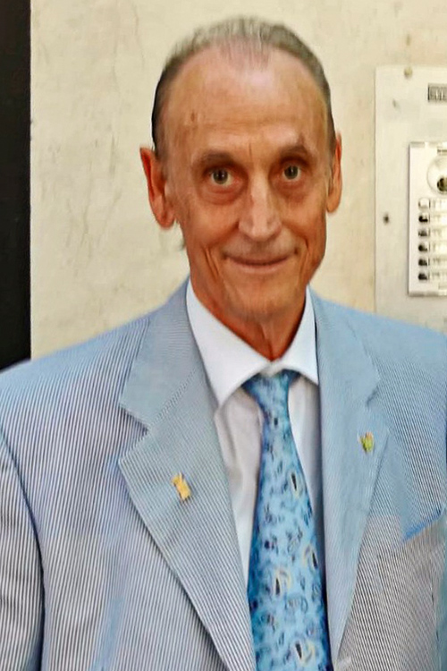 Manuel Ruiz de Lopera, expresidente del Real Betis.